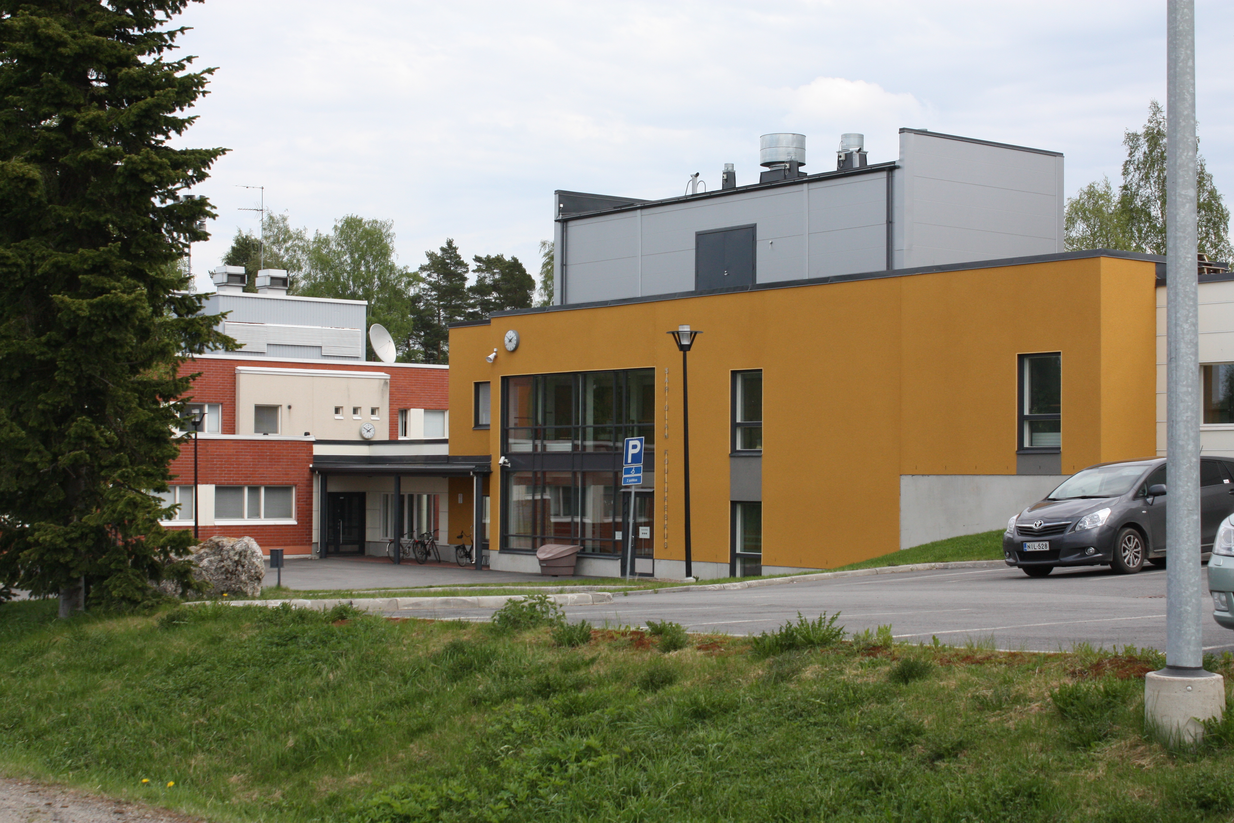 ylakoulu